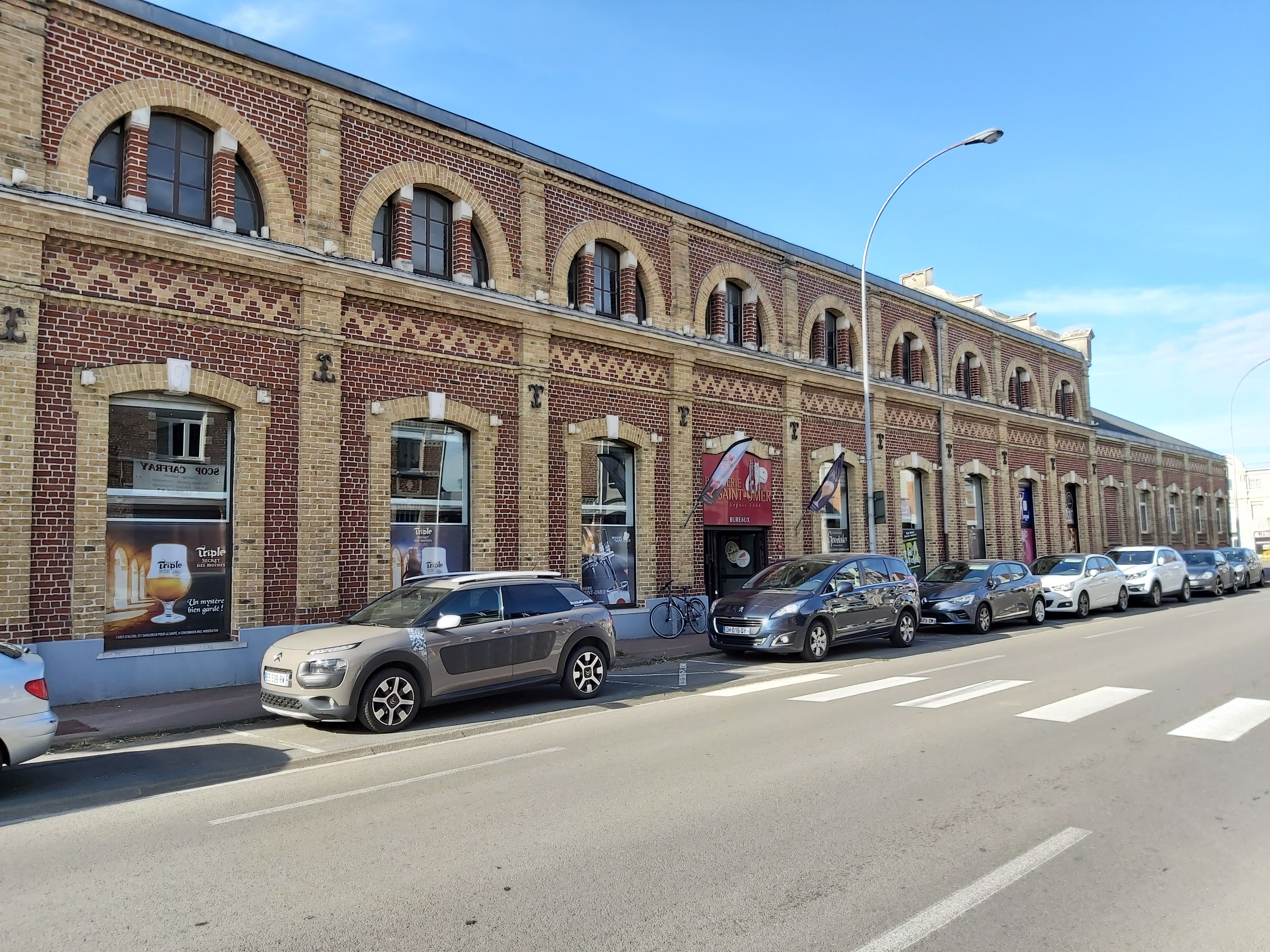 Brouwerij in Sint-Omaars